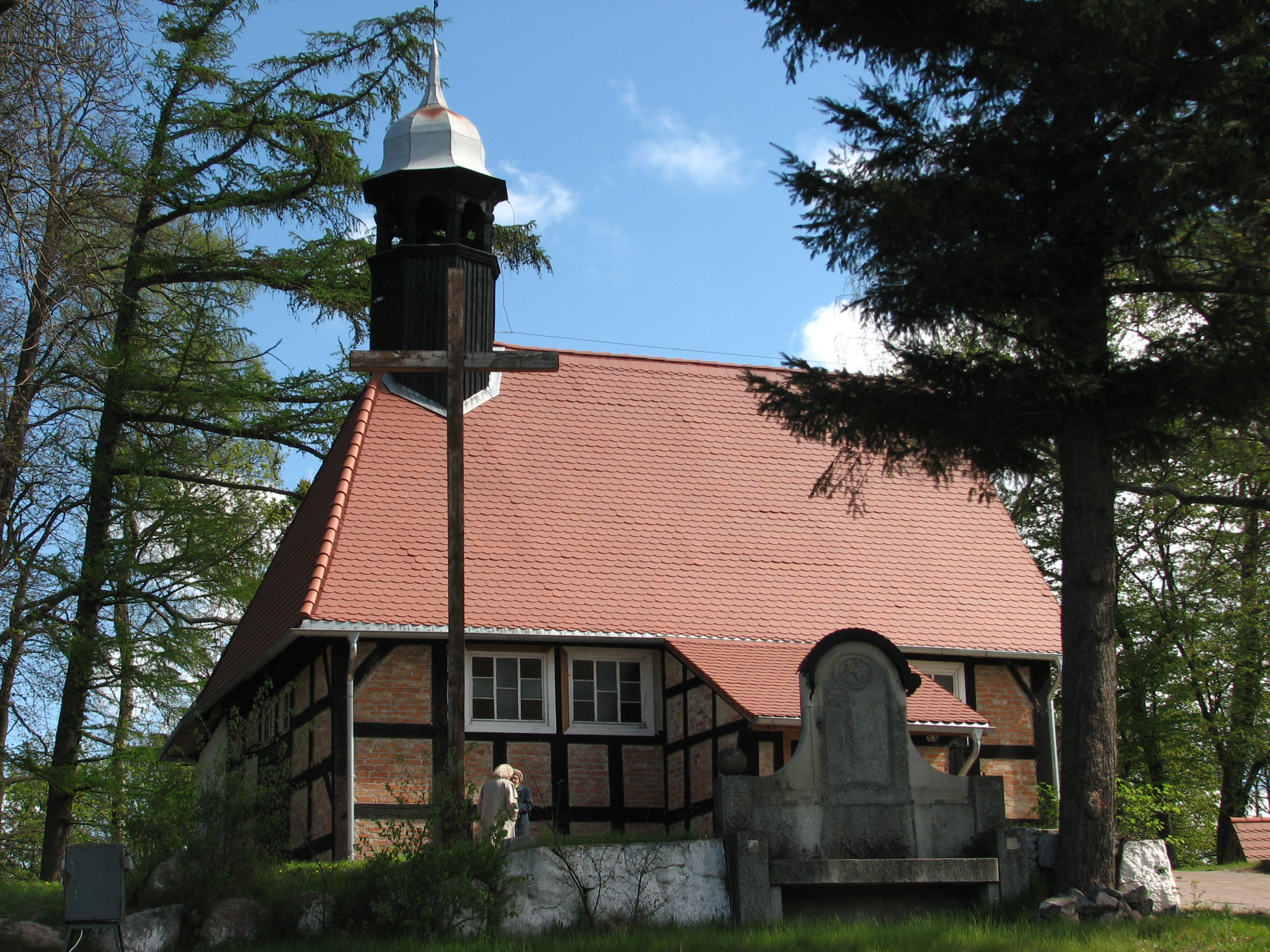 Kościół w Objeździe